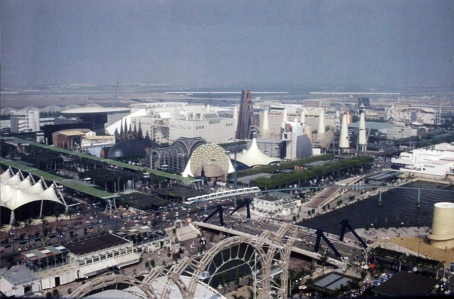 Vista aérea de la Expo de Sevilla 1992.